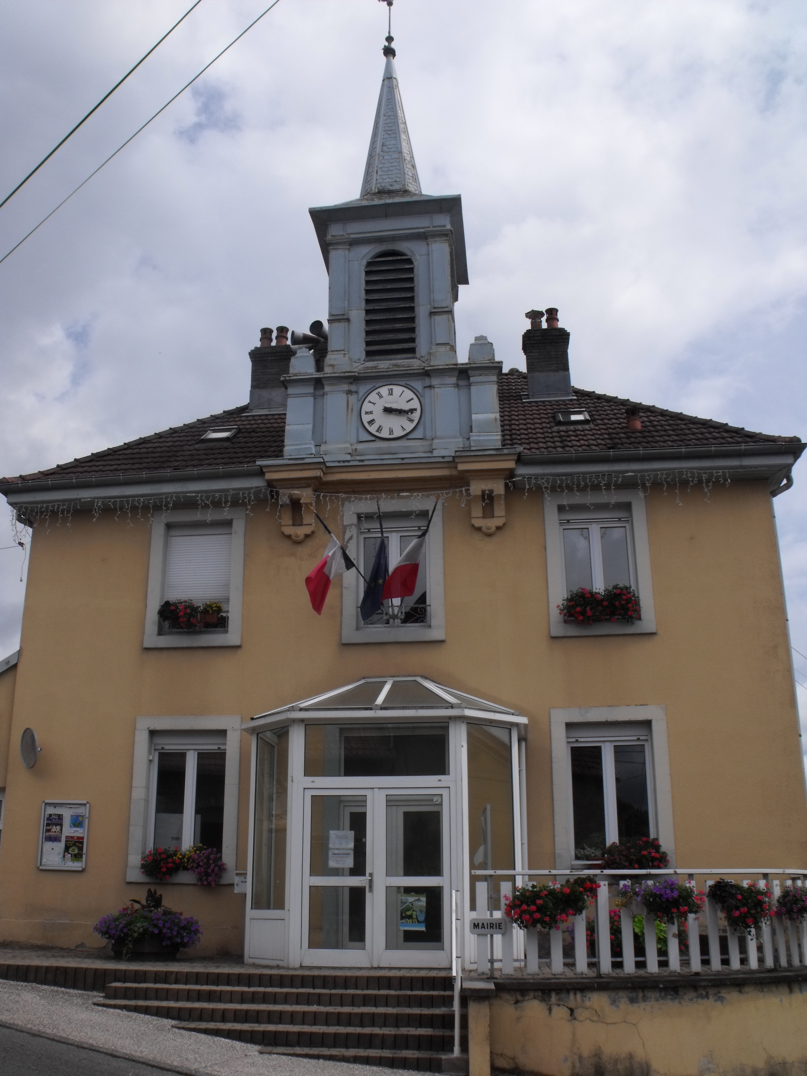 Mairie de Taillecourt, Doubs, France